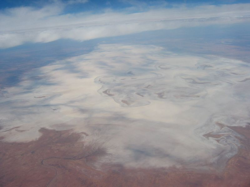 Aerial view Lake Frome 1